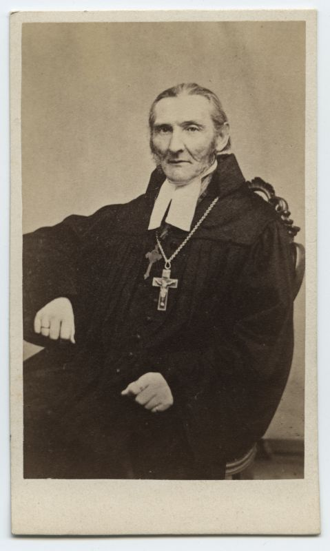 Portree: Hugo Richard Paucker, Simuna Siimona ja Juuda koguduse õpetaja 1834–1872, alates 1850 Virumaa praost